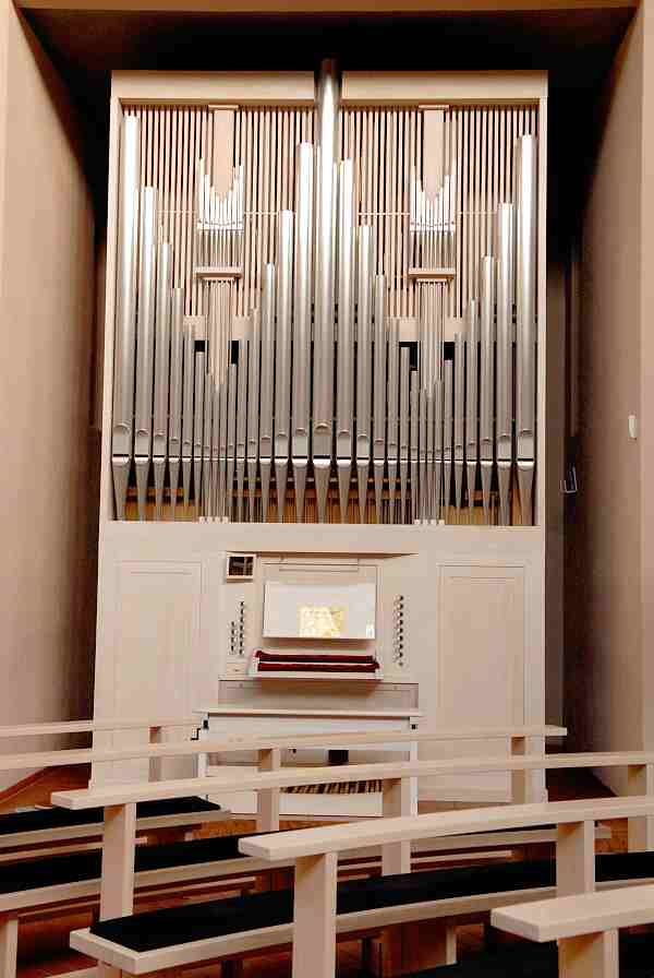 Heilig-Geist-Kirche Bielefeld, Klais-Orgel von 1999